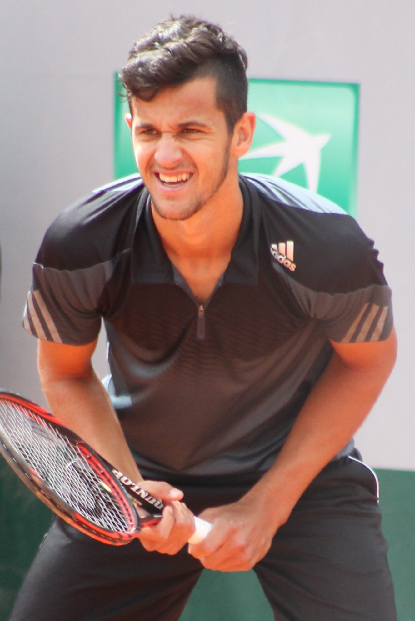 Pavic M. RG15 (2)